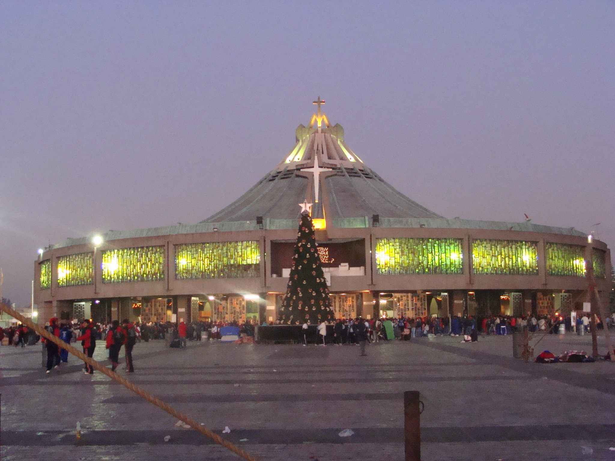 Basilica de Guadalupe